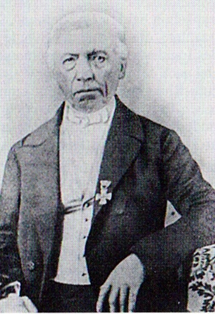 Johann Nikolaus Emmerich, Landvermesser